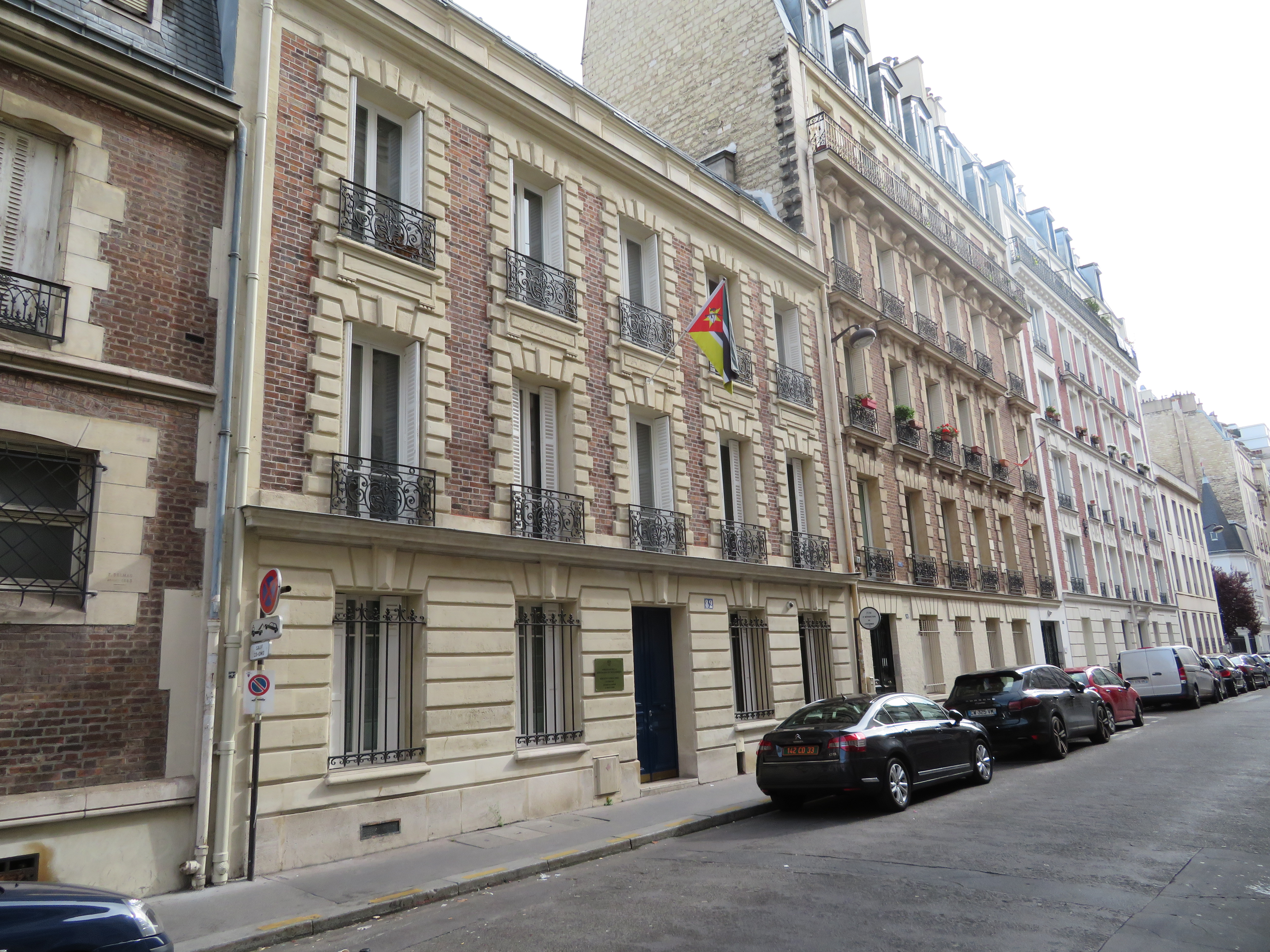 L'ambassade du Mozambique en France, située au 82, rue Laugier à Paris (17ème arrondissement), le samedi 07 octobre 2010.